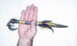 arma aborigen